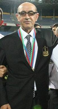 Боюкага Гаджиев 2013